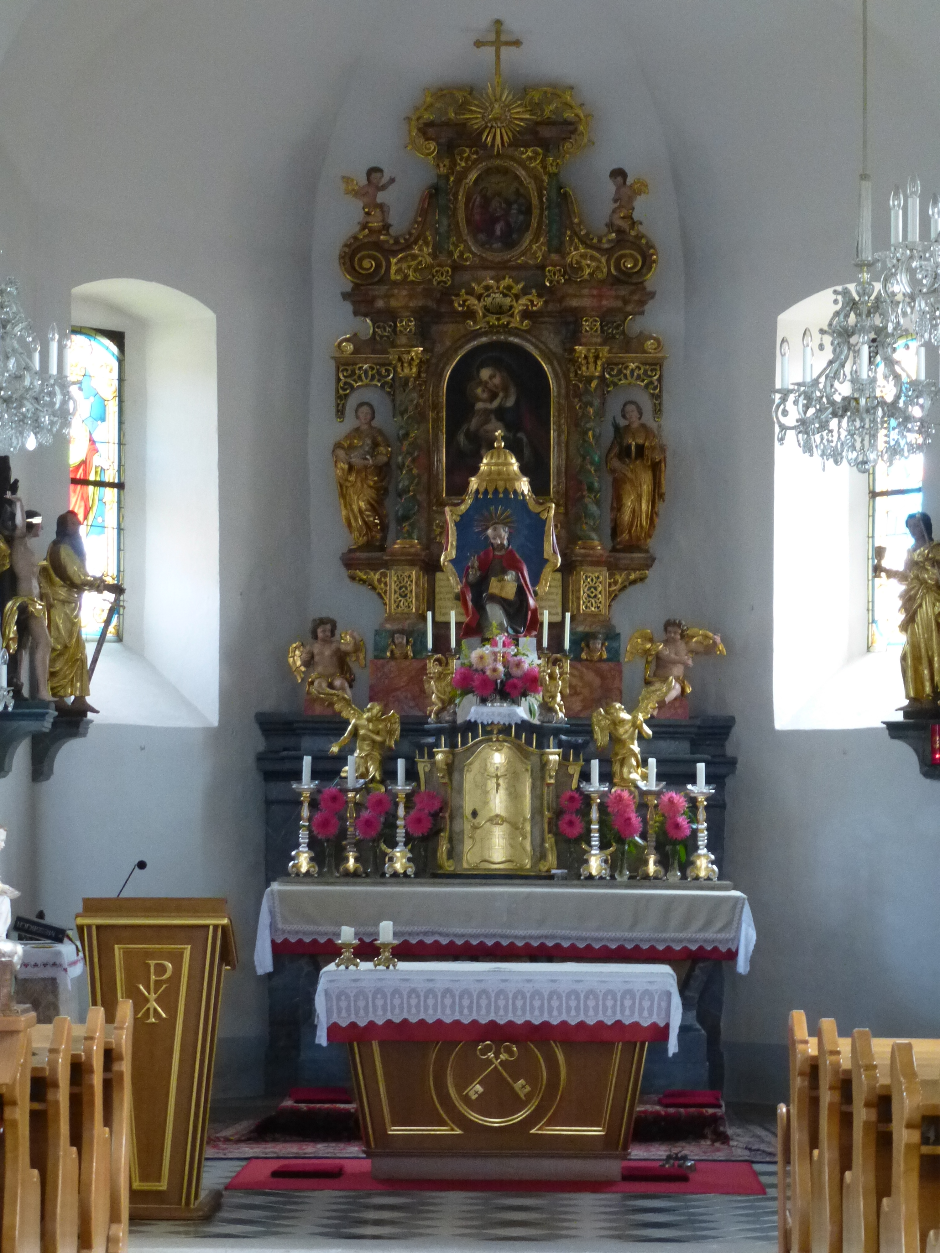 Kath. Pfarrkirche hl. Petrus und Friedhof; Altar